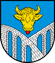 Armoiries de l'ancienne commune de Boveresse. Auteur : Gérard Crameri